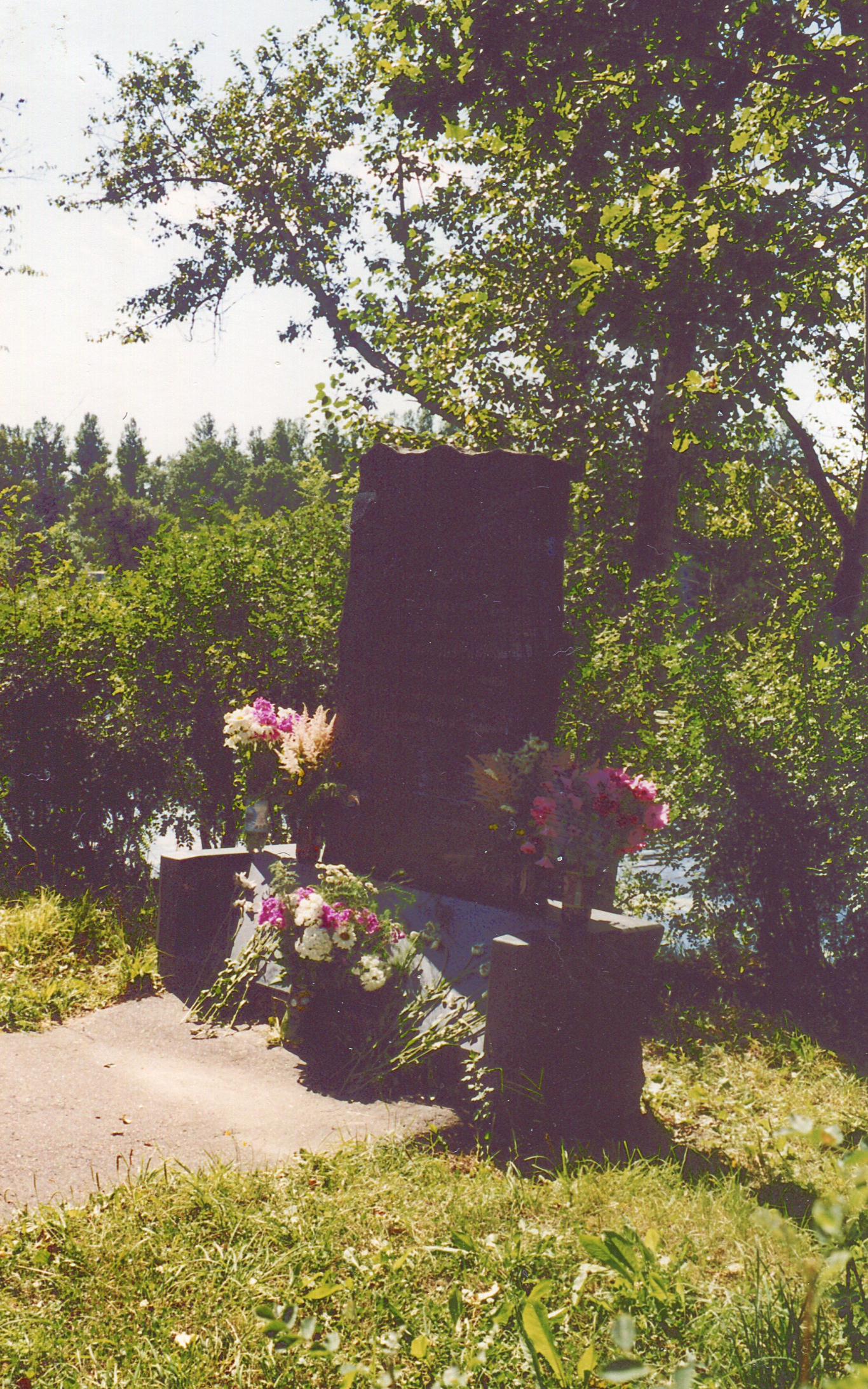 Место стычки Александра со шведами.